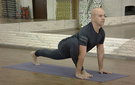 Ашва Санчаланасана в составе комплекса Сурья Намаскар. Выполняет Сергей Замковой